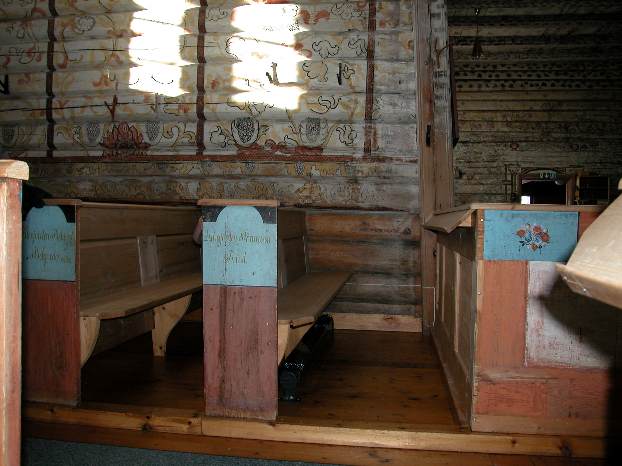 Interiør i Lyngdal kirke, Flesberg. Foto: Ina Borgen Snaprud, fra Riksantikvarens Kulturminnebilder.